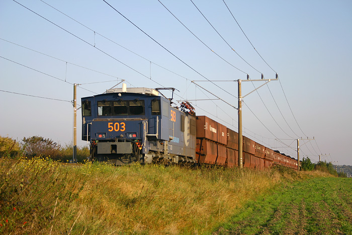 Lok 503 schiebt einen Kohlezug zum Kraftwerk Goldenberg. Aufgenommen in Frechen-Habbelrath. Nord-Süd-Bahn.